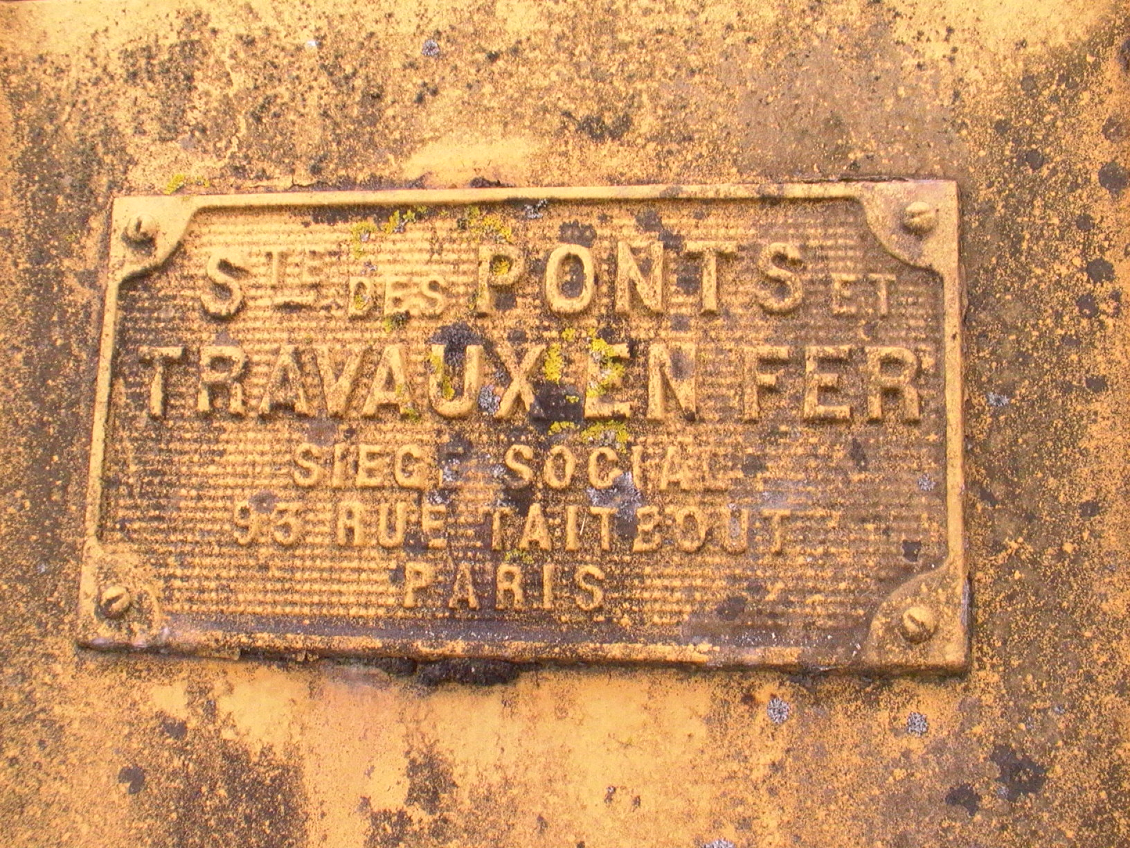 Plaque de la société ayant bâti le pont sur la Seine à Courcelles - Eure